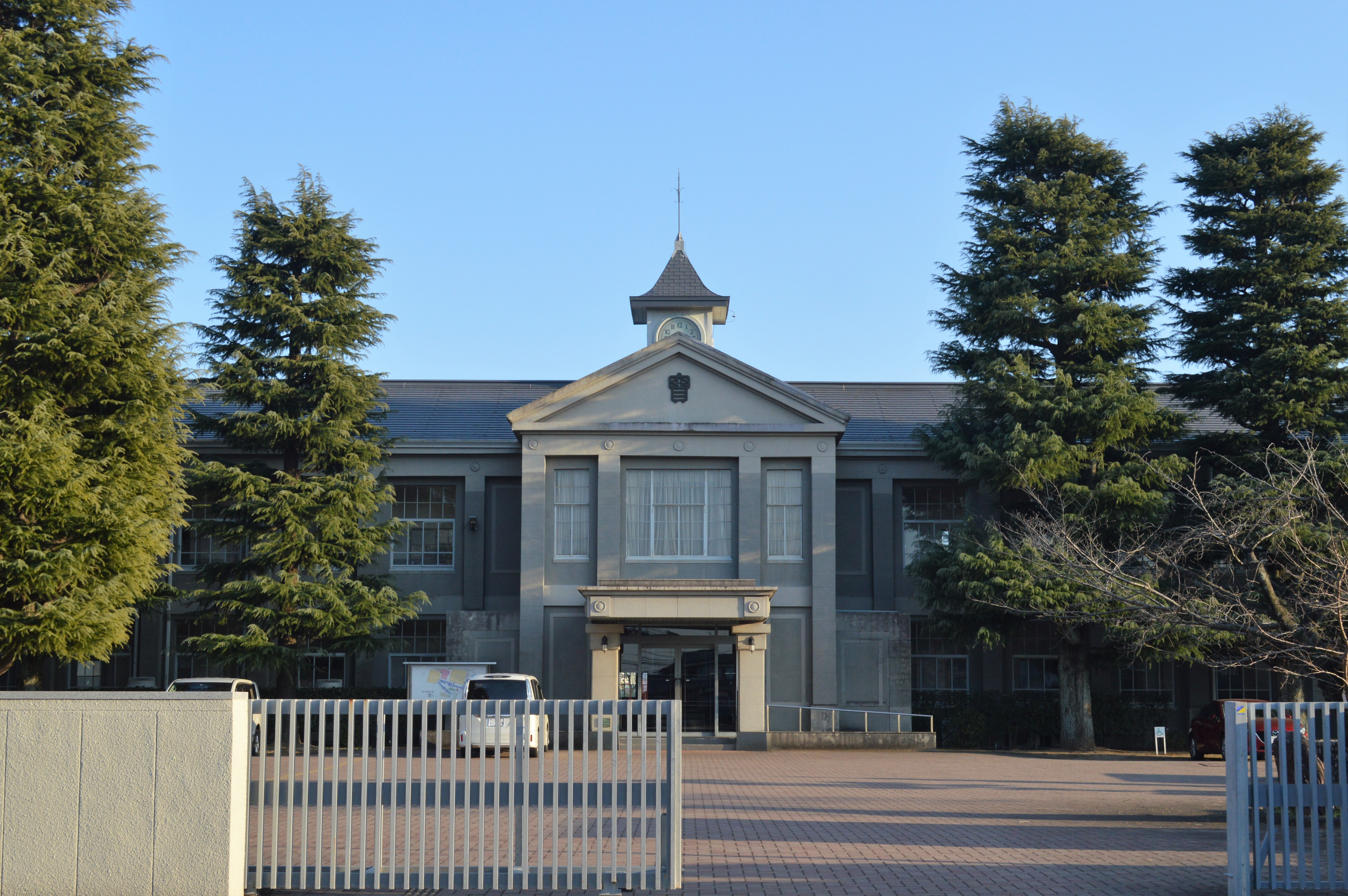 愛知県江南市にある滝学園本館。登録有形文化財。